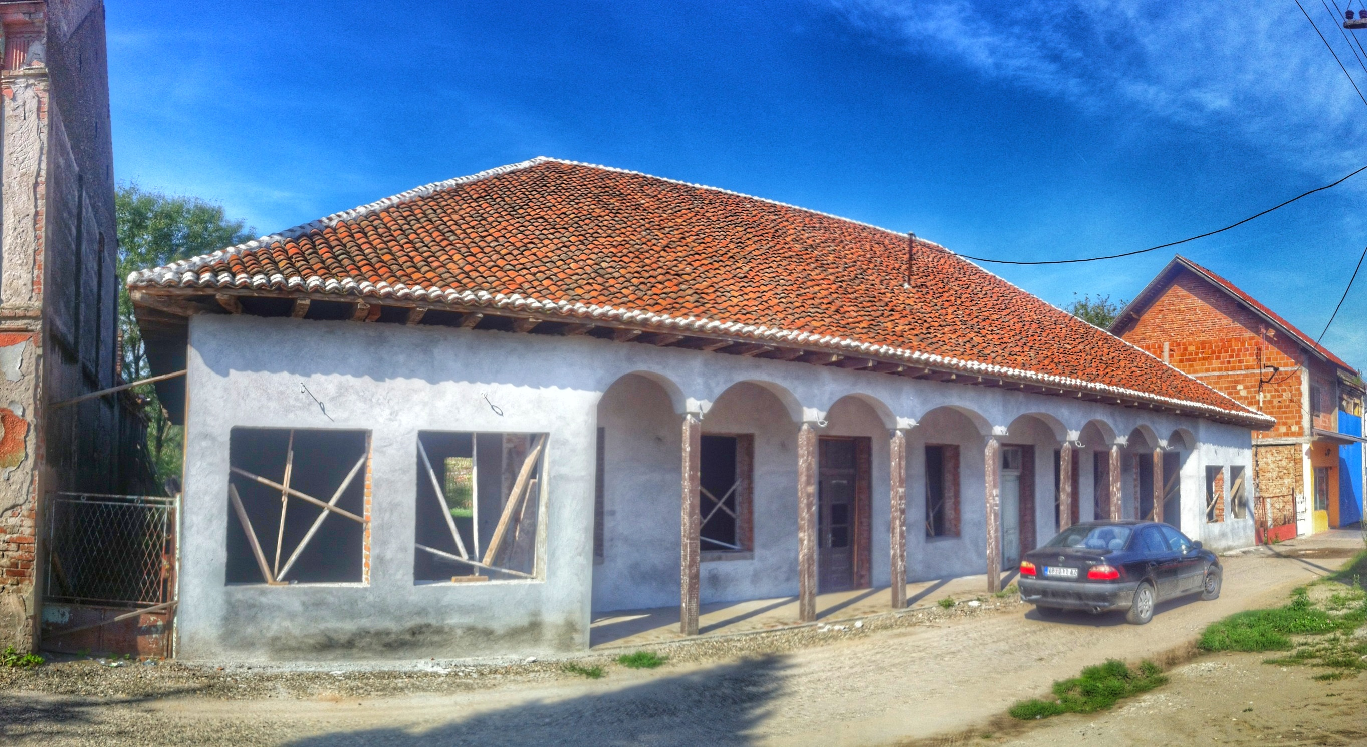 Stara drumska mehana porodice Mladenović u Saraorcima.